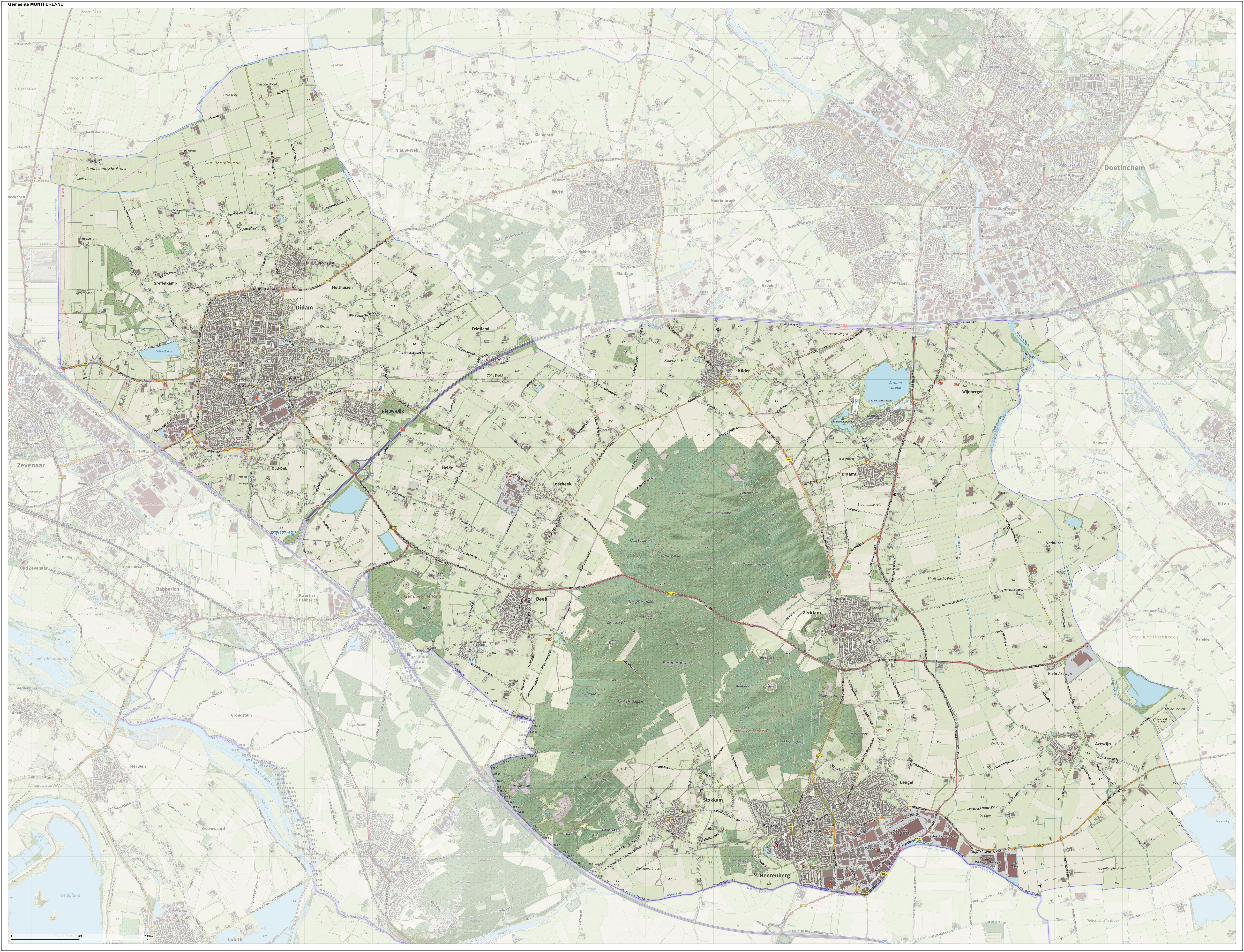 Topografische gemeentekaart. Resolutie: 400 pixels/km. Kaartbeeld samengesteld uit de open geodata van de Top10NL en Top25namen (Kadaster), Creative Commons-BY licentie. Gebouwvlakken uit open geodata BAG extract. Wegen uit de OpenStreetMap, OpenStreetMap community. Reliëfschaduw uit de Actuele Hoogtekaart AHN2. Samenstelling en kleurenschema: Jan-Willem van Aalst, met QGIS. Zie ook de Legenda.